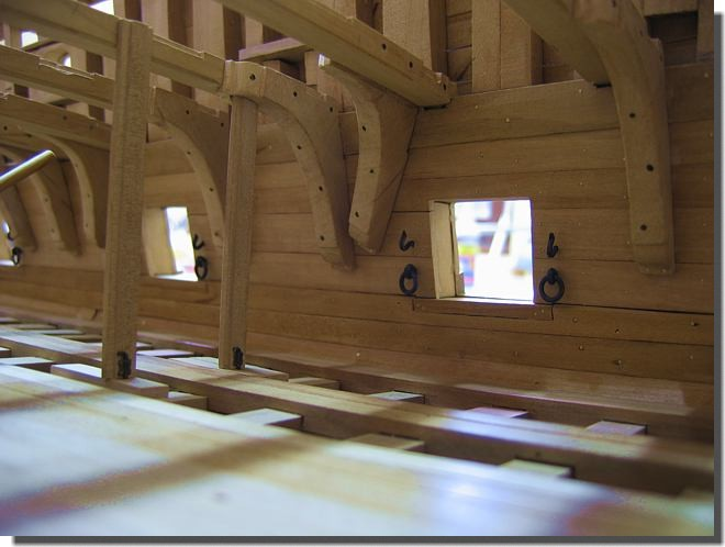 Le Fleuron - détail de charpente